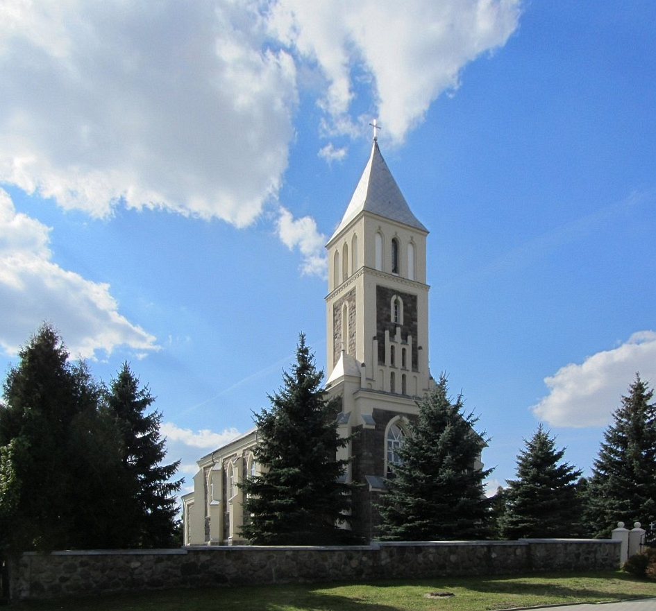 Вялікая Бераставіца Касцёл Перамянення Божага